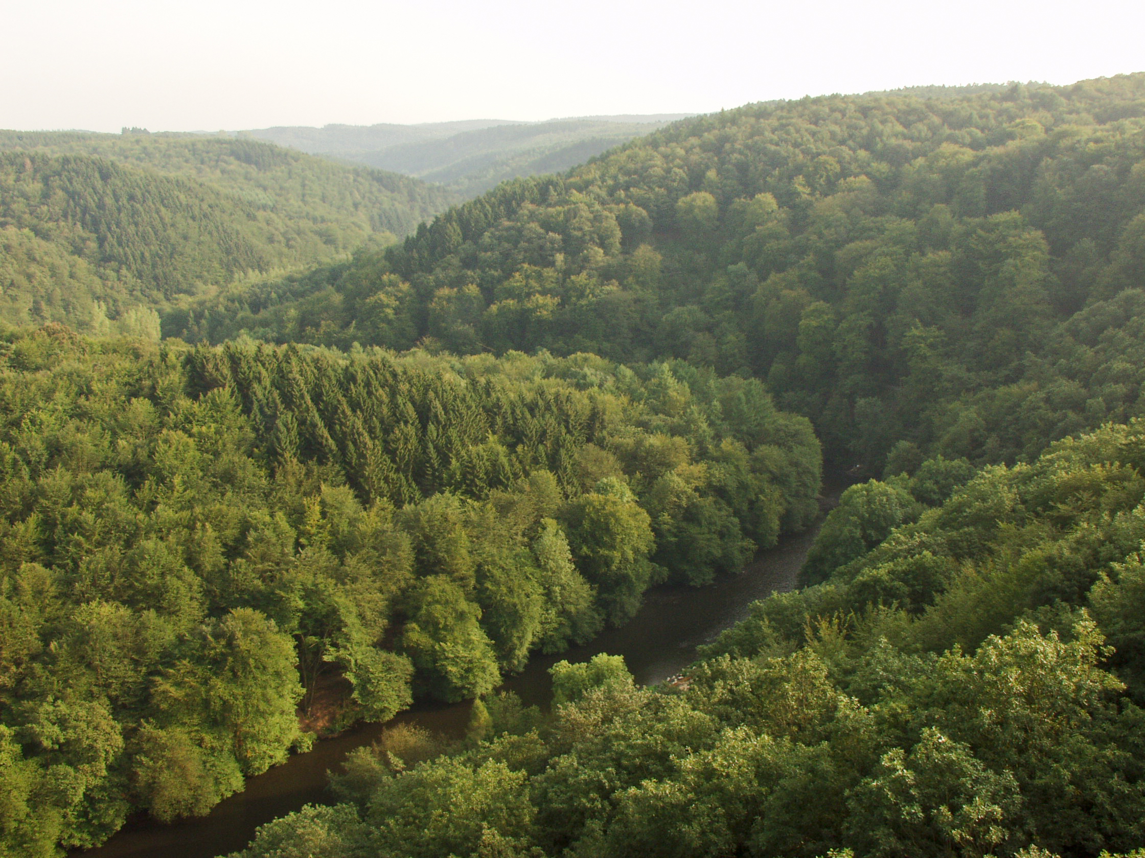 Blick von der Müngstener Brücke auf die Naturschutzgebiete RS-019 (Wupper und Wupperhänge südlich Müngsten) auf der linken Seite und SG-002 (Tal- und Hangbereiche der Wupper mit Seitenbächen) auf der rechten Seite